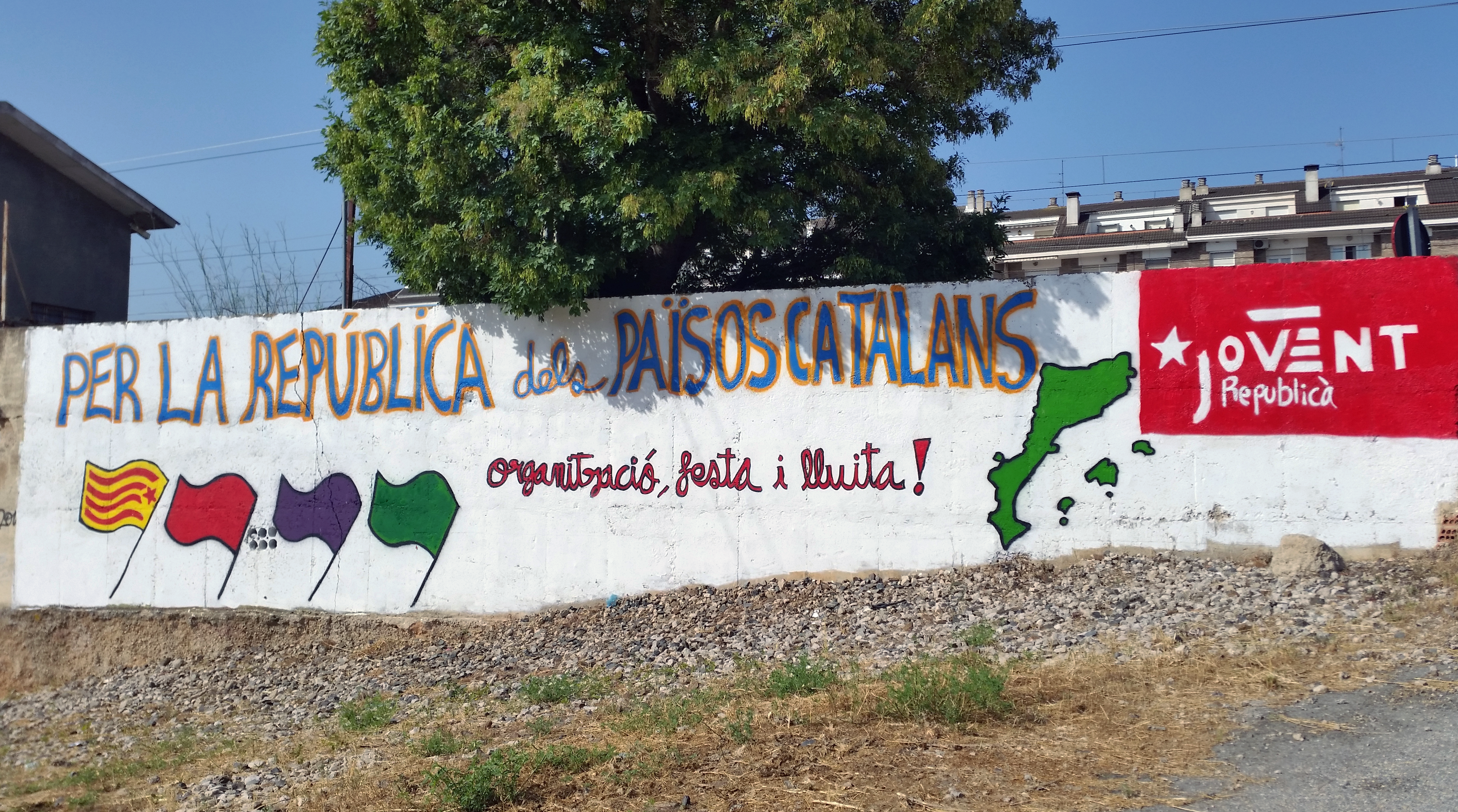 Mural pintat a Montblanc per l'ocació de l'Acampada Jove 2018.